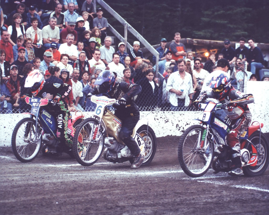 El Speedway un deporte motor , con motos con la cual no tienen freno y se compite en un ovalo.